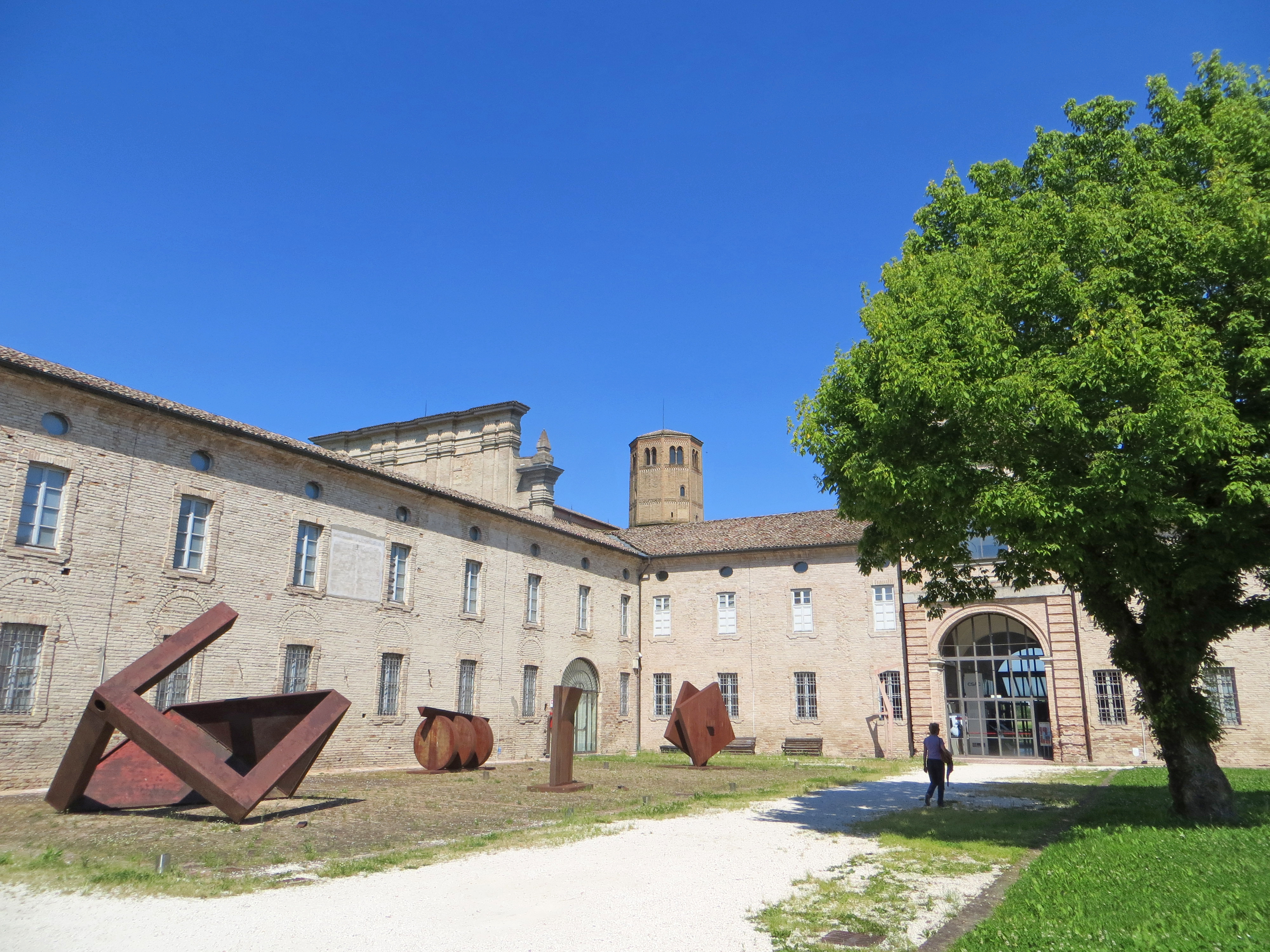 Abbazia di Valserena (Paradigna - Parma) - corte delle Sculture (lati nord ed est)